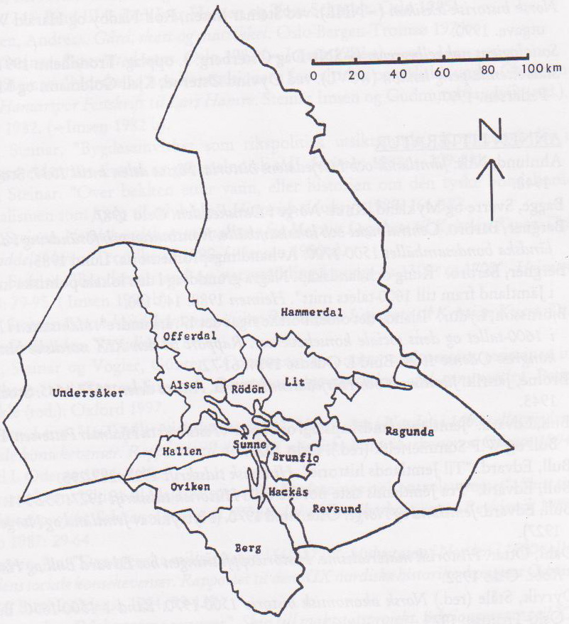 Karta över Jämtlands tingslag under 1600-talet